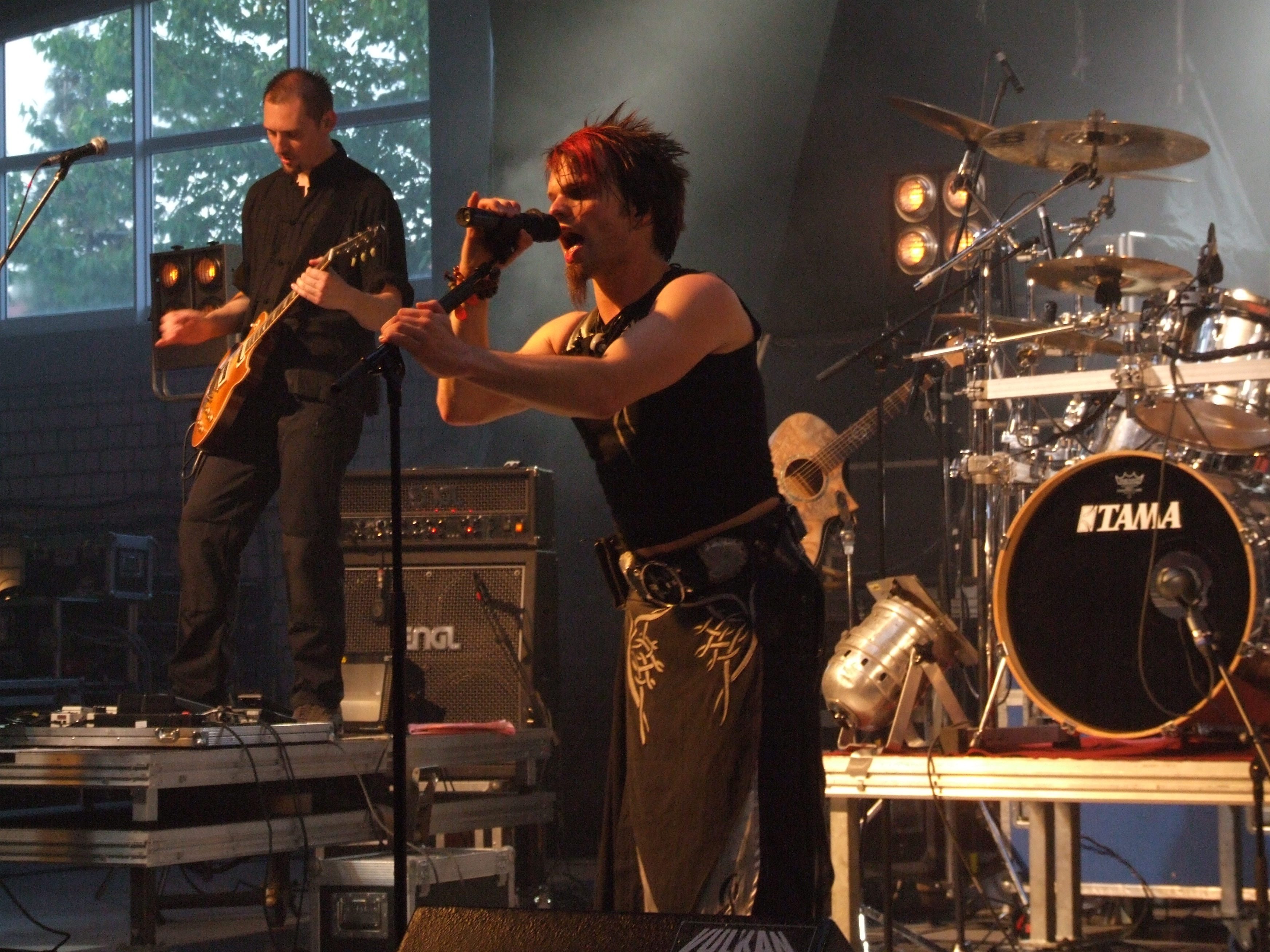 Im Vordergrund Sänger Alea der Bescheidene der deutschen Mittelalter- und Rock-Band Saltatio Mortis (Totentanz), am 13. Juni 2009, Sommerfesthalle, Otterstadt, Deutschland